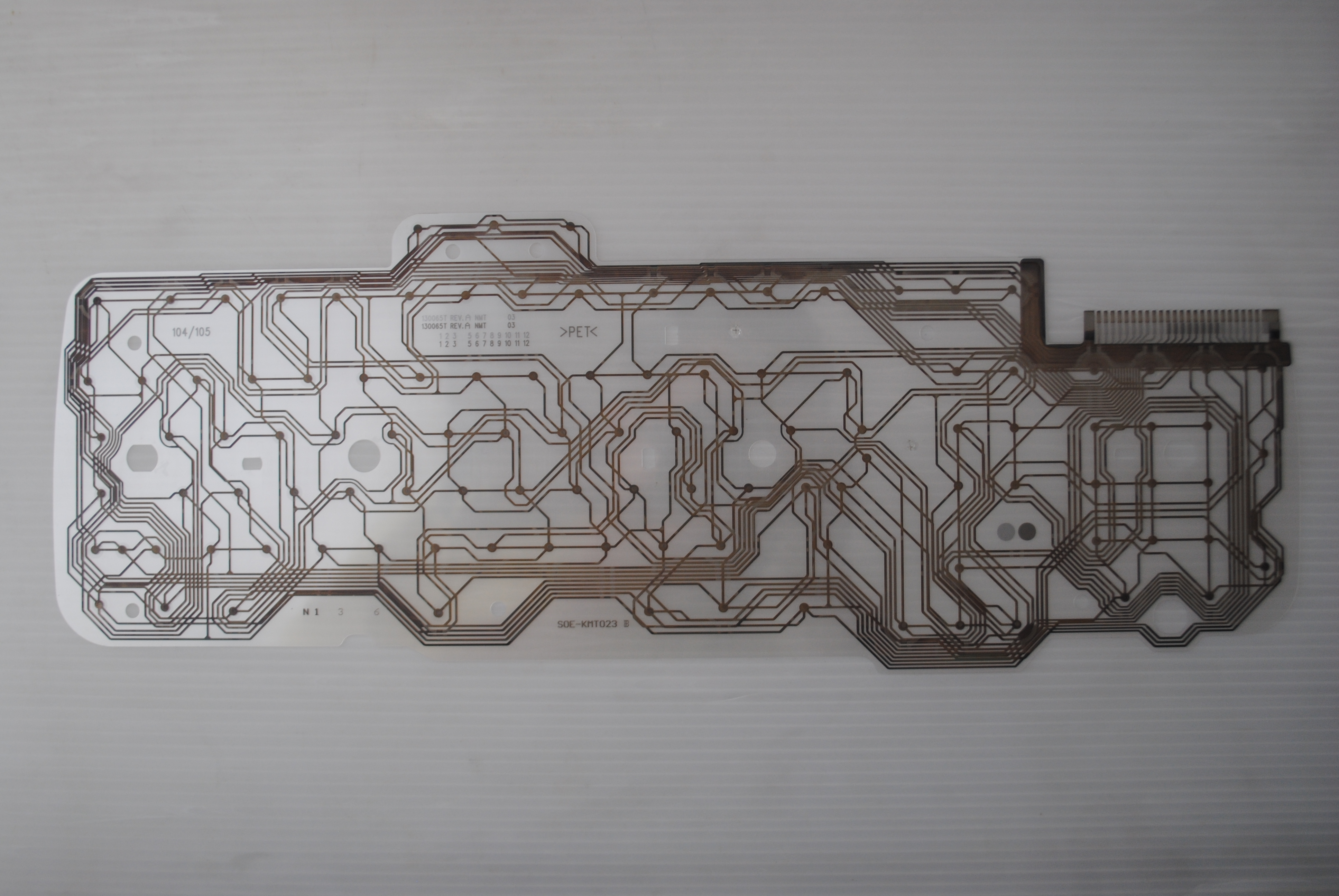 bilgisayar klavyesinden bir görünüm